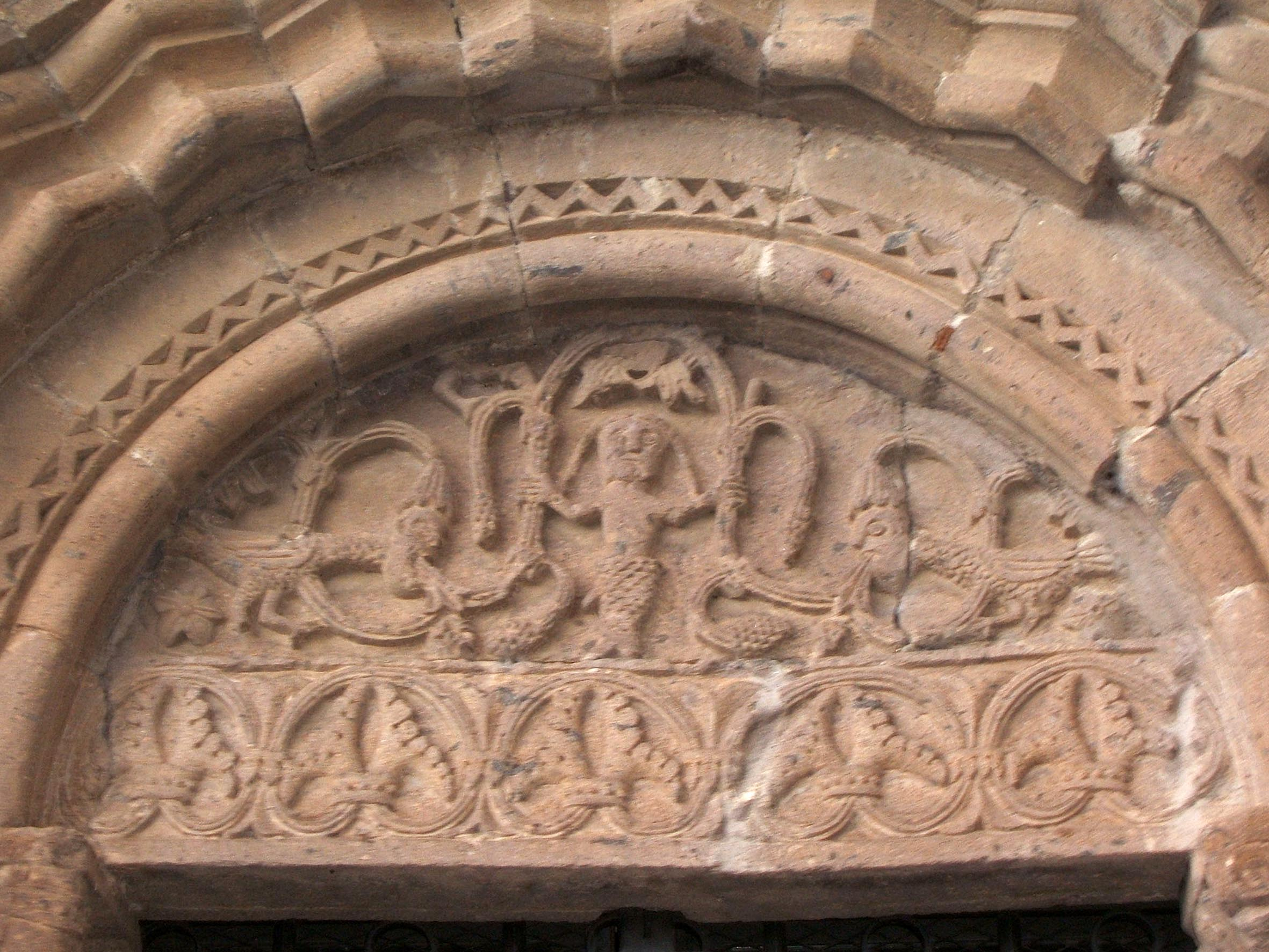 Portal Santa Maria Maggiore Tuscania